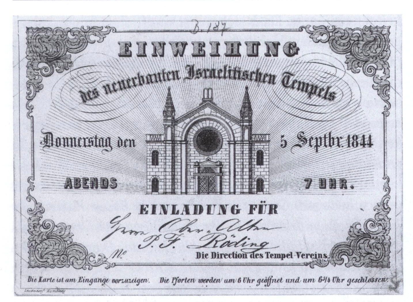 Einweihungskarte Tempel Poolstraße